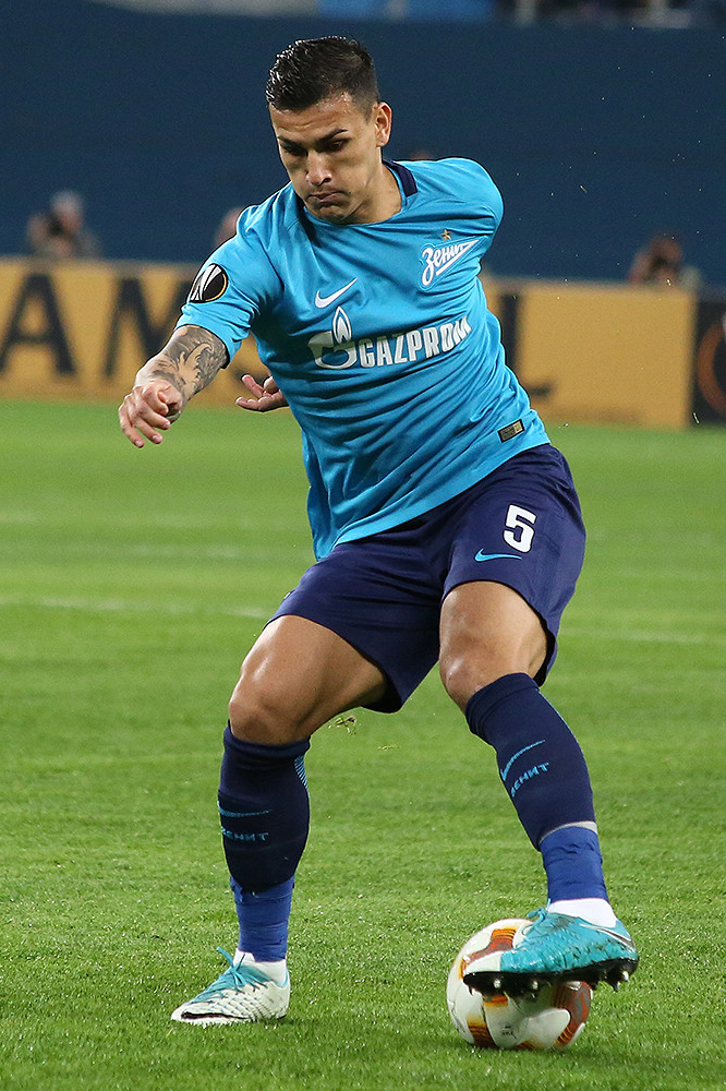 «Зенит» не оставил шансов «Селтику»